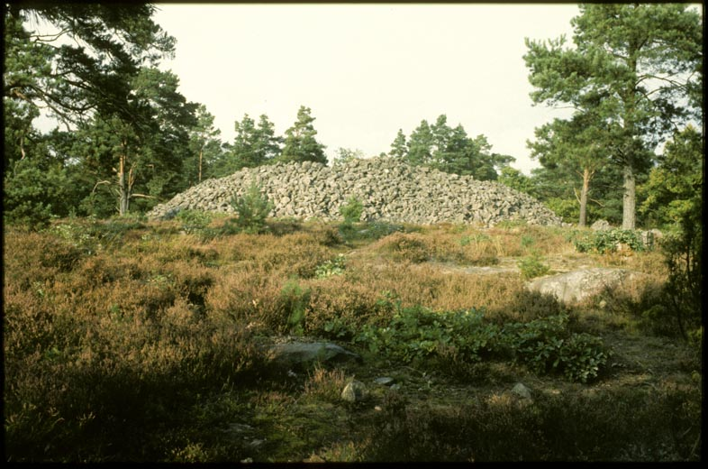 RAÄ-nummer Karlshamn 29:1. Röse med brätte på Stärnö kallat Höga rör. Det är Blekinges största gravröse, närmast 5 meter högt. Motiv: Karlshamn 29:1 Kategori: Röse RAÄ-nummer Karlshamn 29:1. Röse med brätte på Stärnö kallat Höga rör. Det är Blekinges största gravröse, närmast 5 meter högt. Karlshamn 29:1.